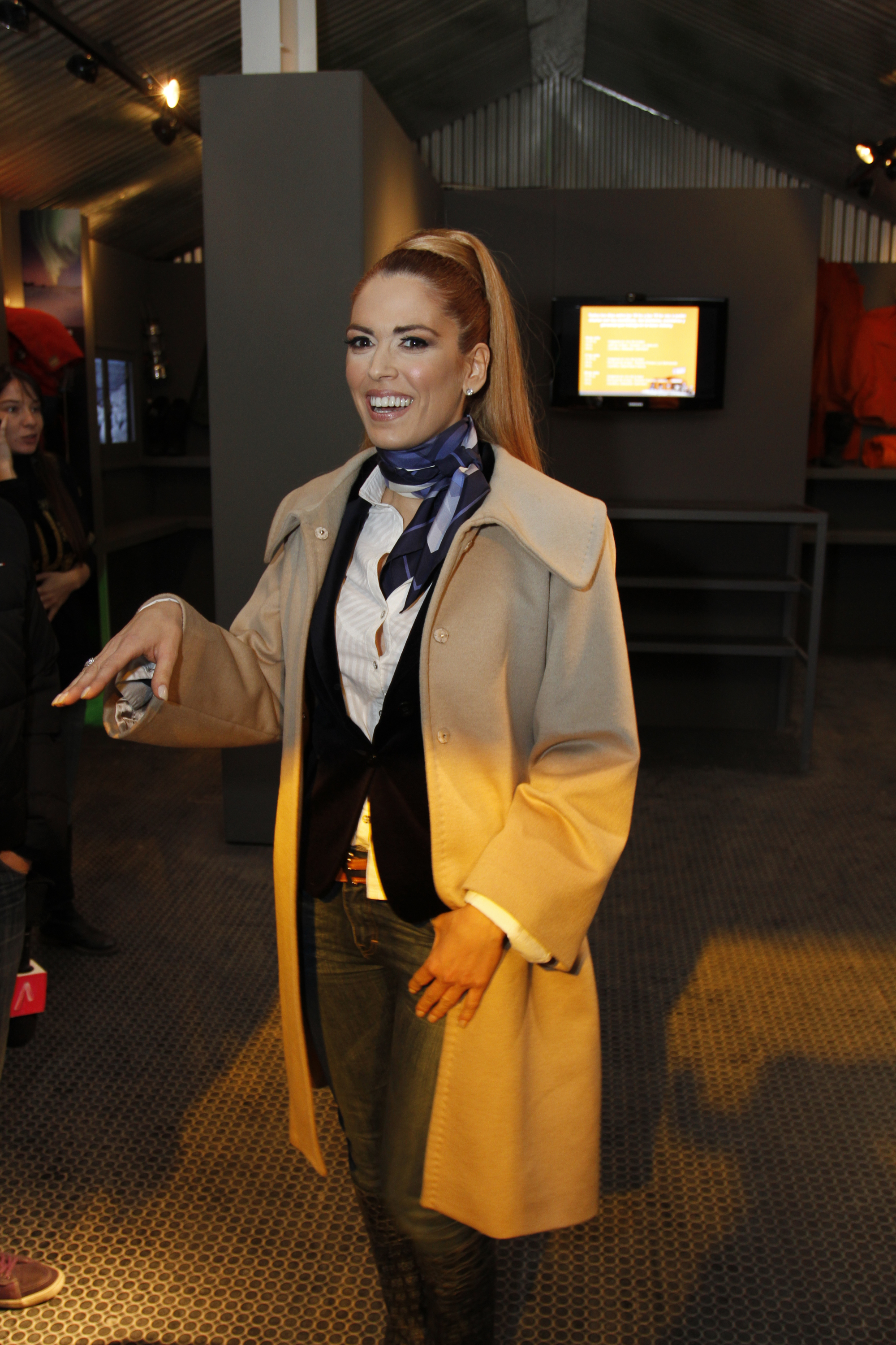 22 de Julio de 2011. Viviana Canosa visito Tecnópolis y le realizó una entrevista al Secretario Gral. de la Presidencia Oscar Parrilli. Fotos: Mariano Sandá